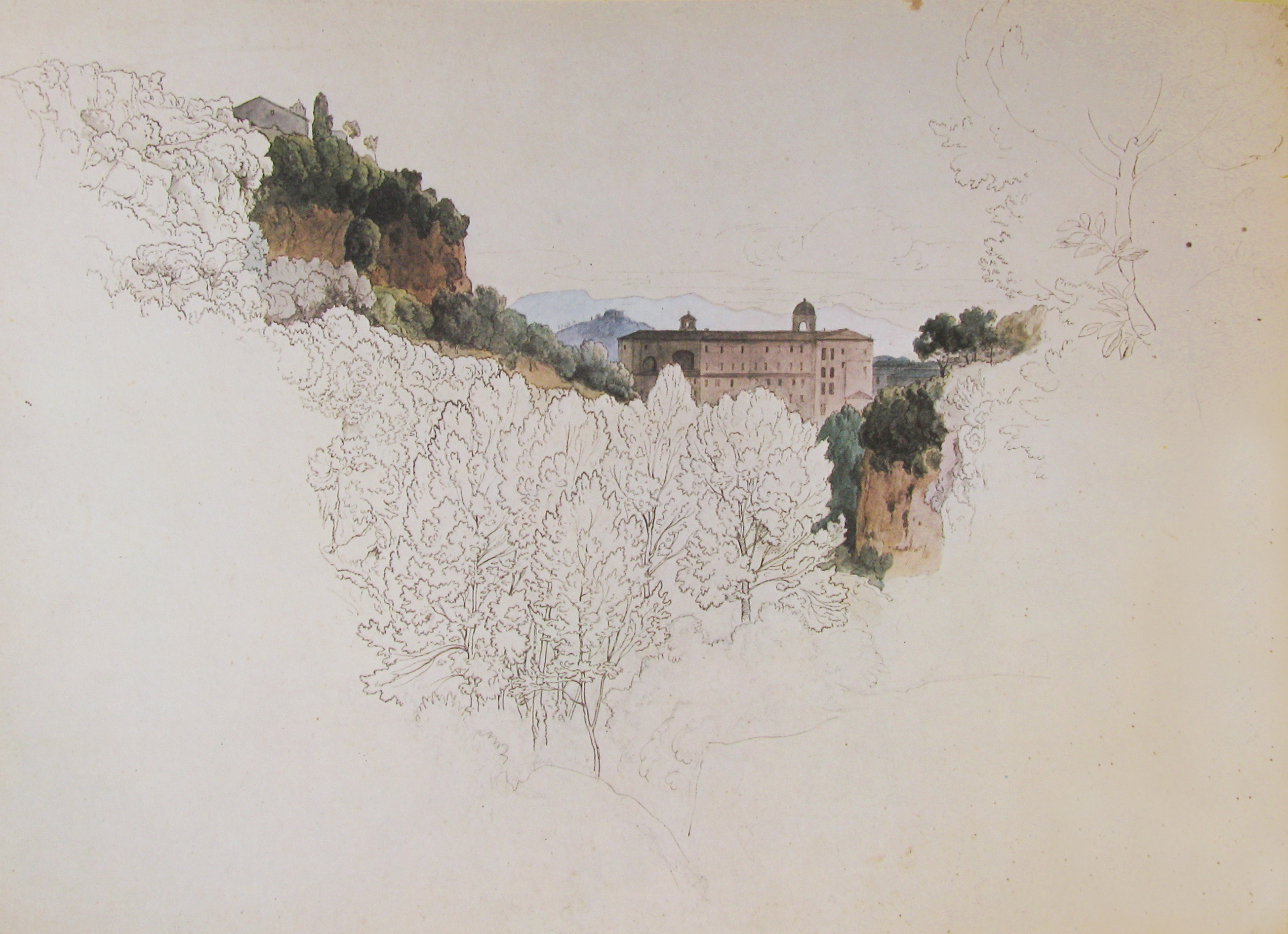 Italienische Landschaft mit Kloster